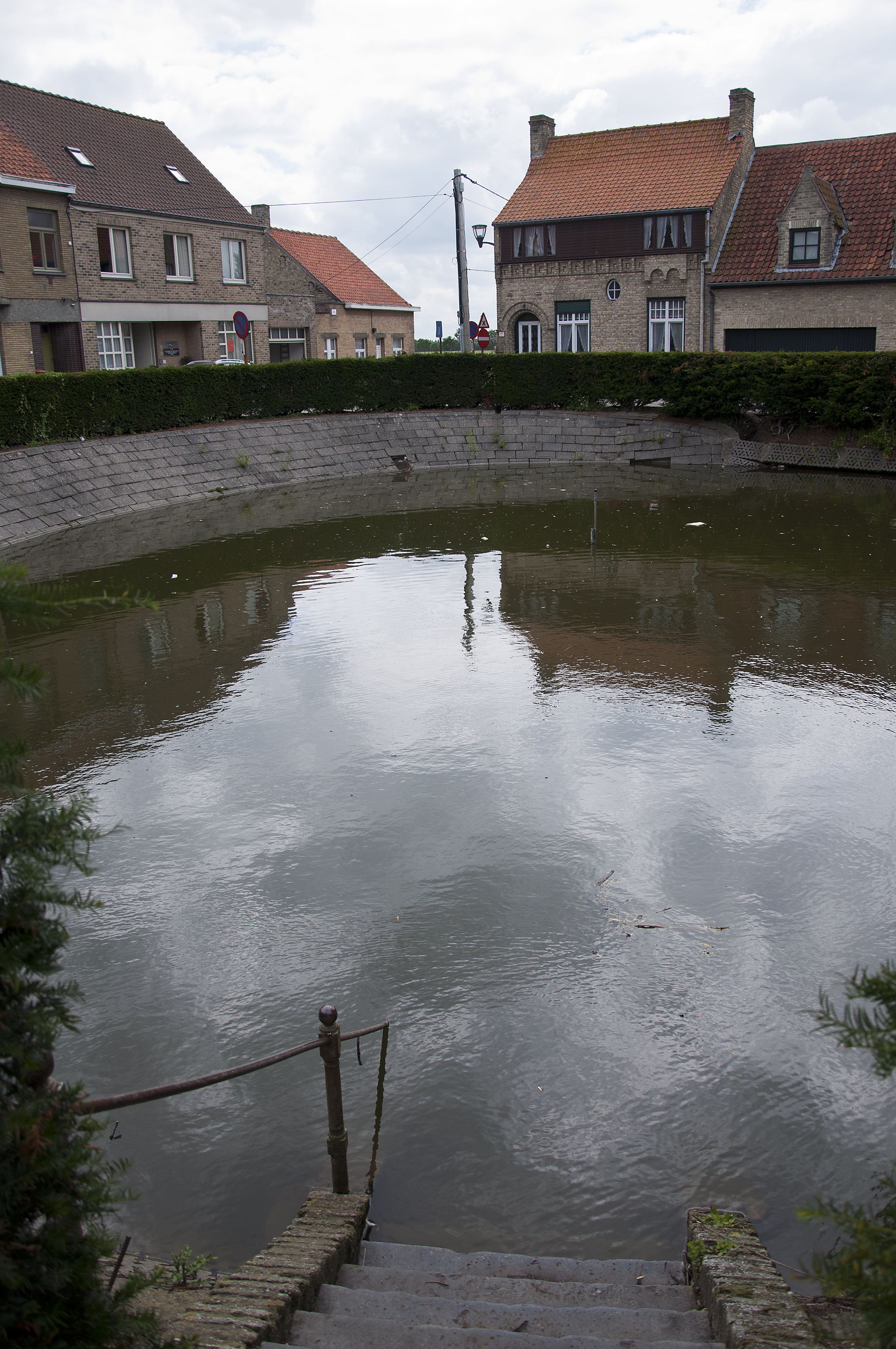 De Vatevijver te Lo, België - opslagplaats voor regenwater in een polderdorp waar meestal alleen brak water voorhanden was